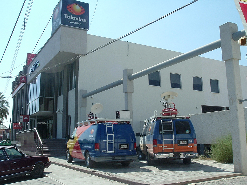 Instalaciones de Televisa Laguna, en Torreón, Coahuila, MEX.